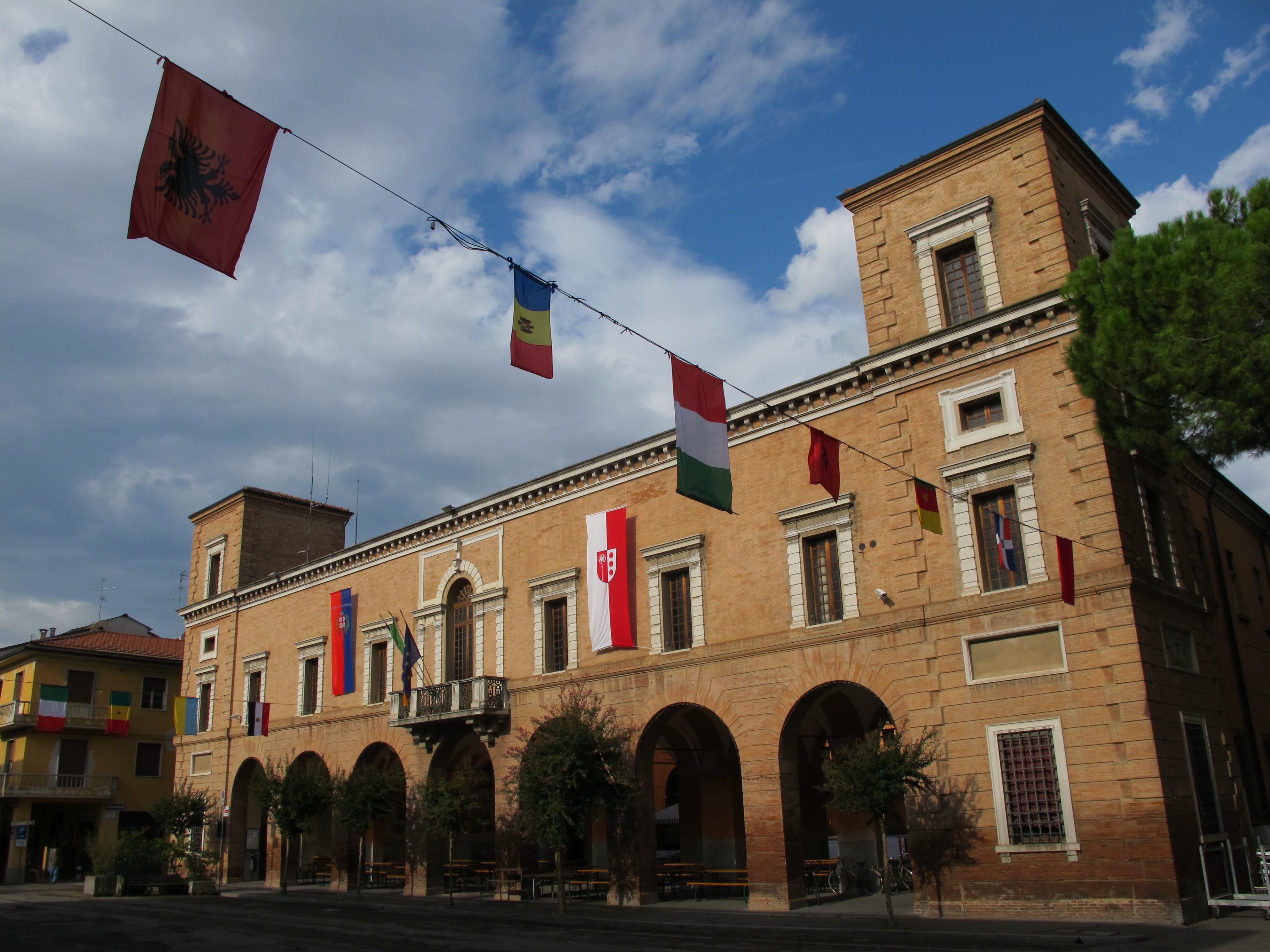 Palazzo municipale - palazzo Mengoni This is a photo of a monument which is part of cultural heritage of Italy.